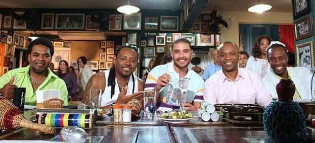 O conjunto musical (samba) Negritude Júnior com João Nogueira, no programa Samba na Gamboa, TV Brasil, 2013